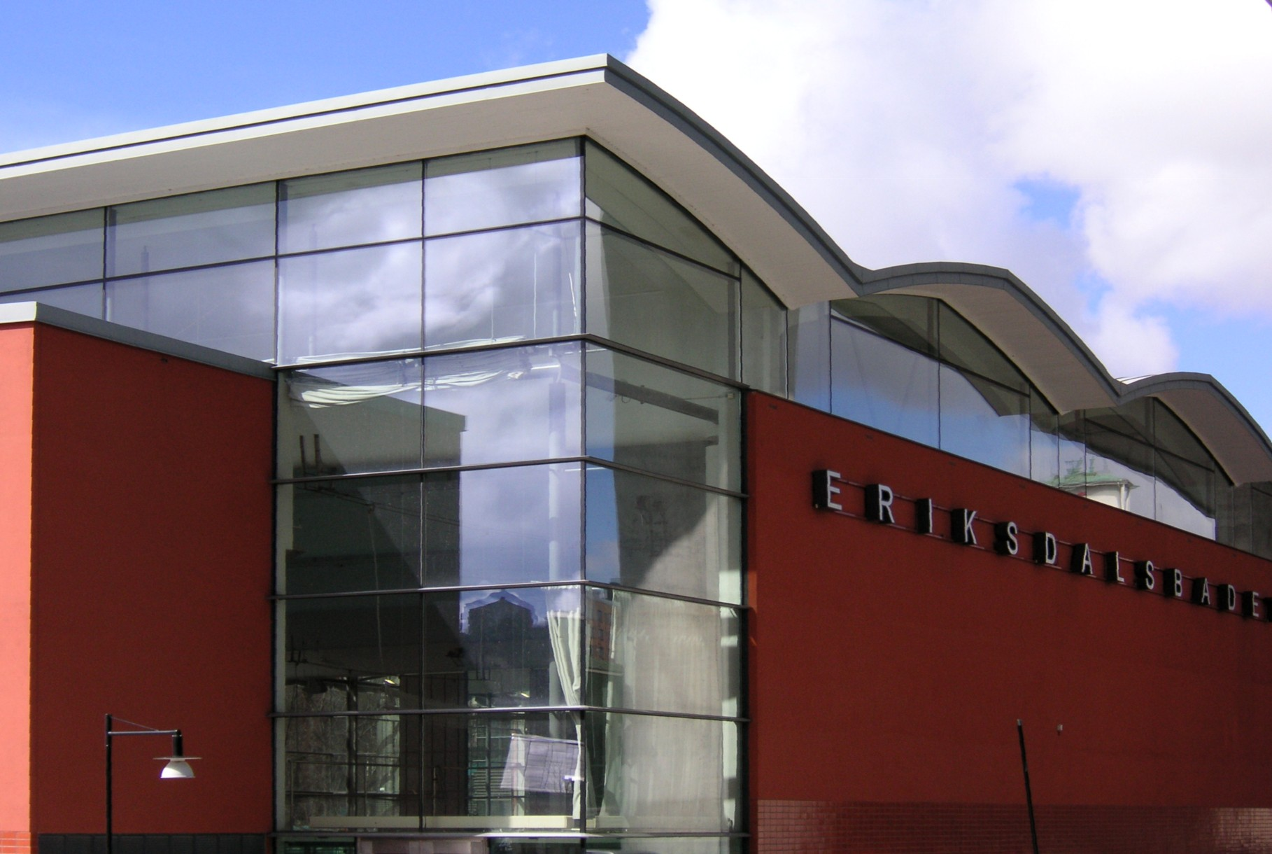 Eriksdalsbadet i Stockholm